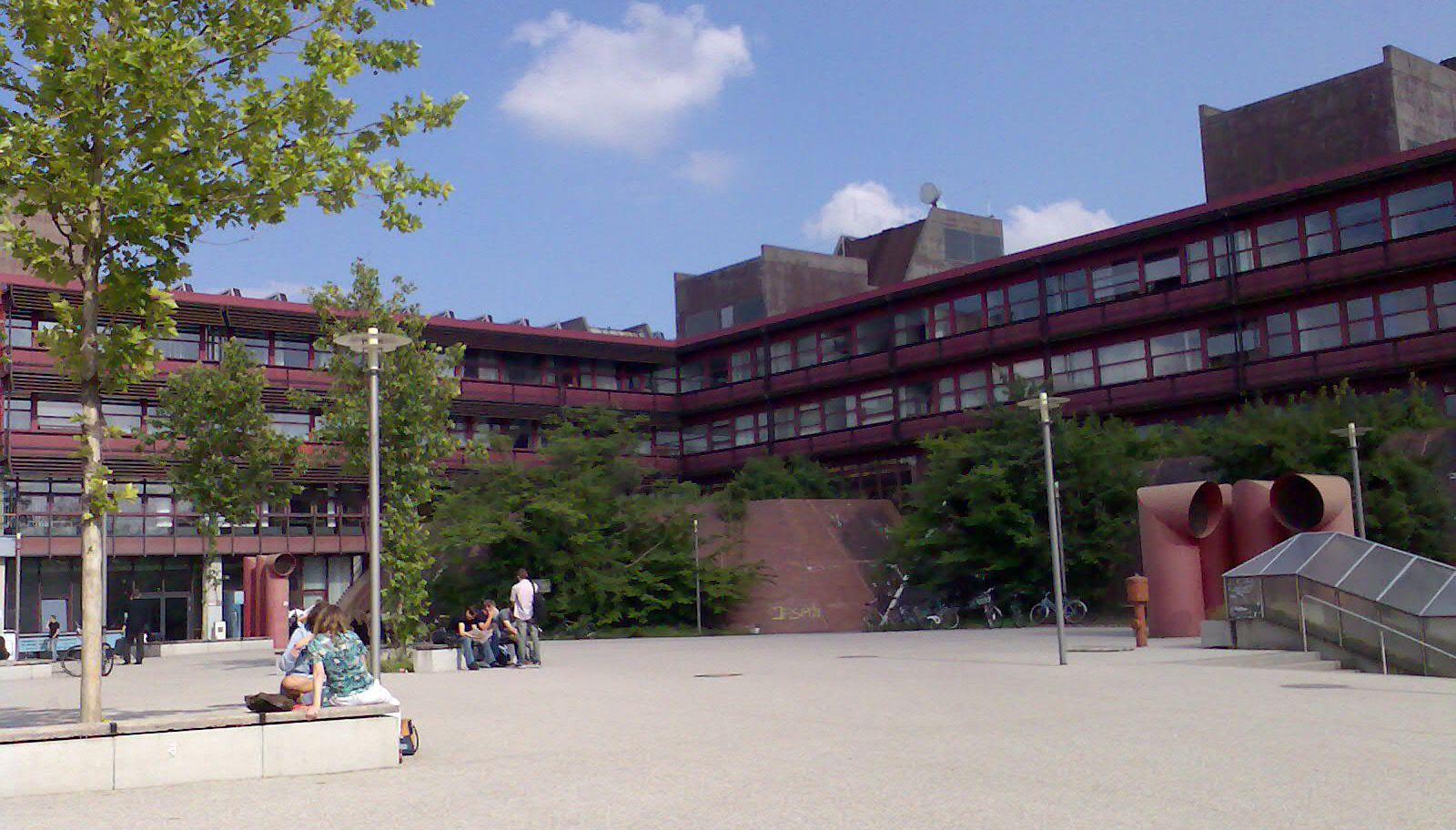 Campus der Universität Erlangen Nürnberg - Lange Gasse